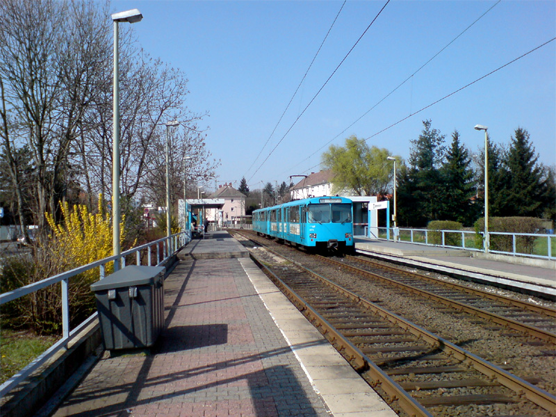 Stadtbahnstation Oberursel-Bommersheim